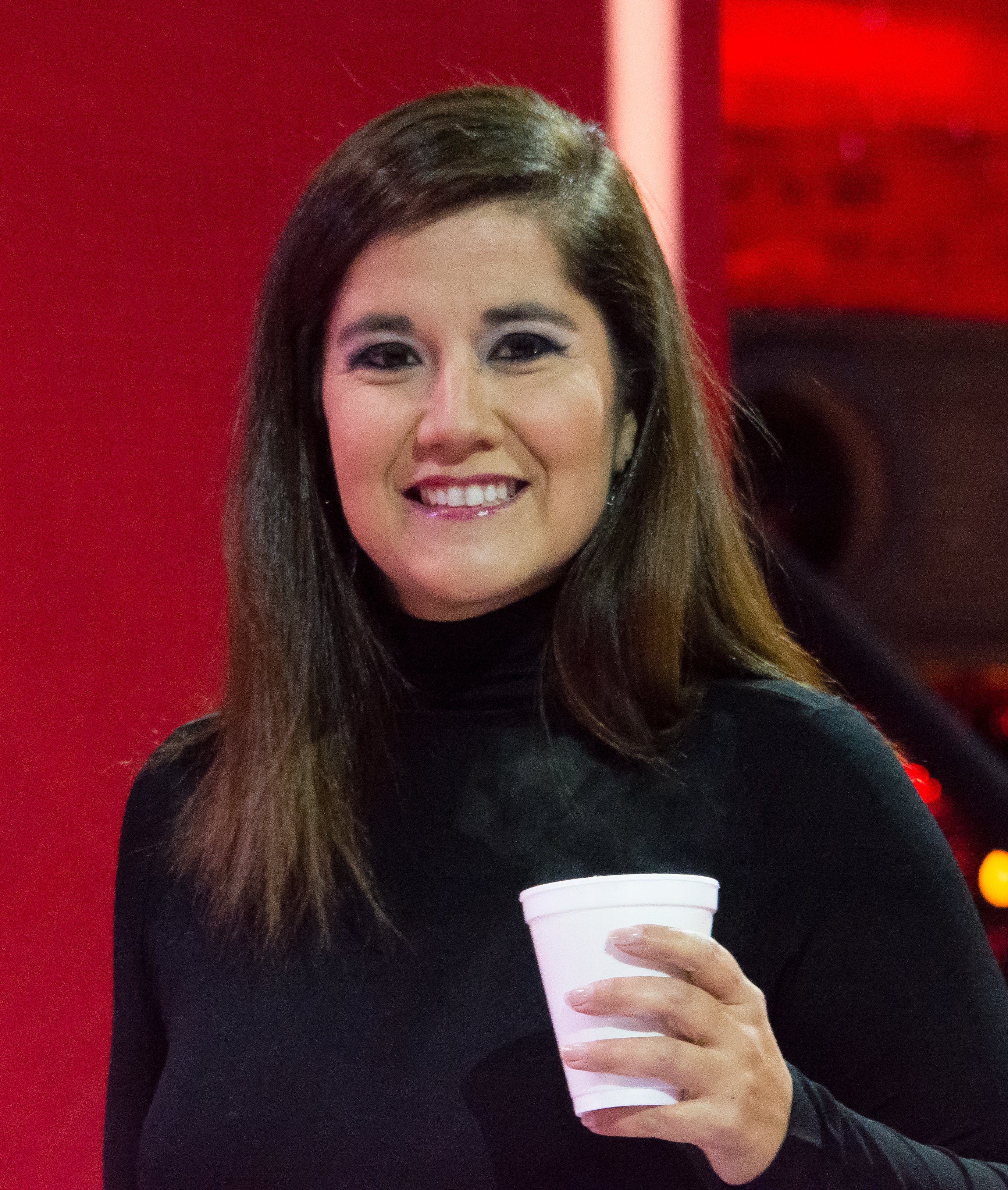 Carolina Soto, Rojo, Televisión Nacional de Chile, Santiago, Chile.